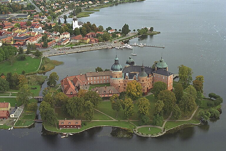 Motiv: Gripsholms slott Nyckelord: Byggnadsminnen:Statl, Flygbilder, Riksintressen Kategori: Herrgårds-/slottslandskapGripsholms slott